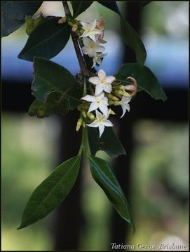 Creative Commons Attribution Share Alike 2.0 (CC BY-SA 2.0) Some rights reserved © Tatiana Gerus View source Supplier: Flickr: EOL Images Photographer: Tatiana Gerus Location Created: Brisbane, Queensland, Australia View full-size image